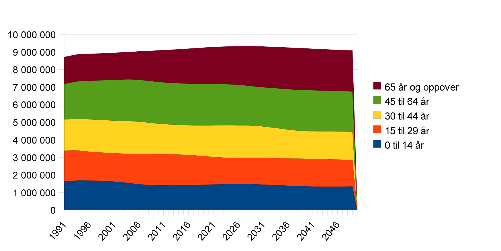 Graf berekna folketalsutvikling i Sverige 1991-2050 fordelt på aldersgrupper.